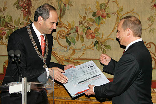 АМСТЕРДАМ. В городской ратуше.